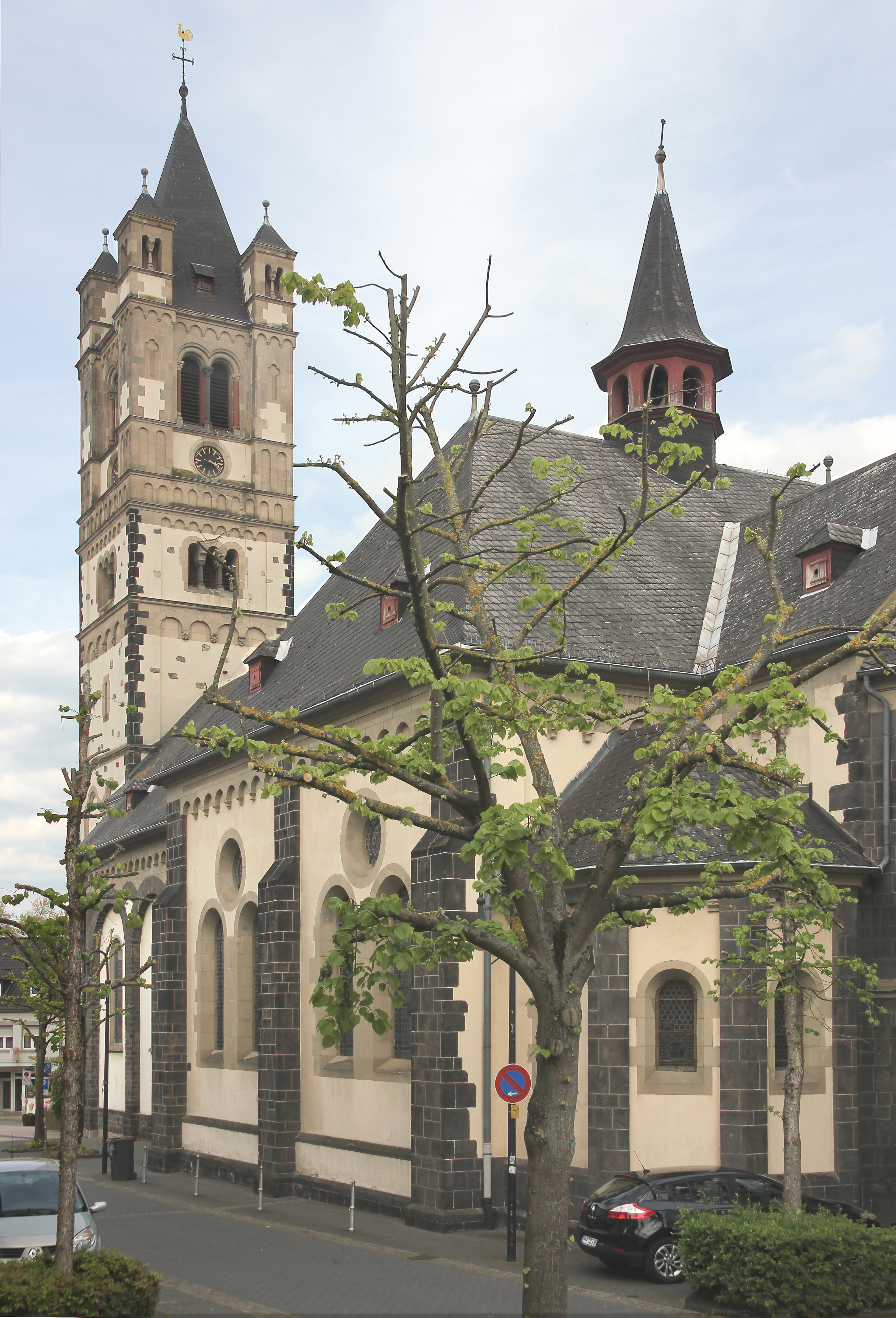 Katholische Pfarrkirche Hl. Dreifaltigkeit in Weißenthurm, 1936 bis 1939 erbaut nach Plänen von Claudius von Lassaulx, 1900 bis 1902 erweitert von Caspar Clemens Pickel